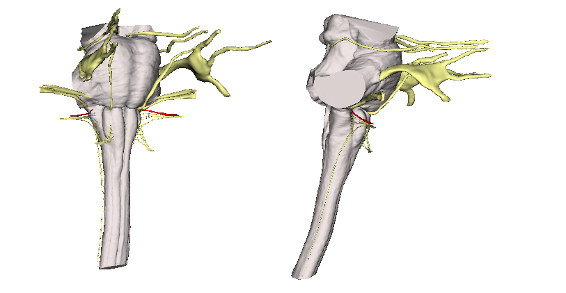 IX.bikote kraneala ikusten da, erraboilaren oliba atzeko ildotik ateratzen.